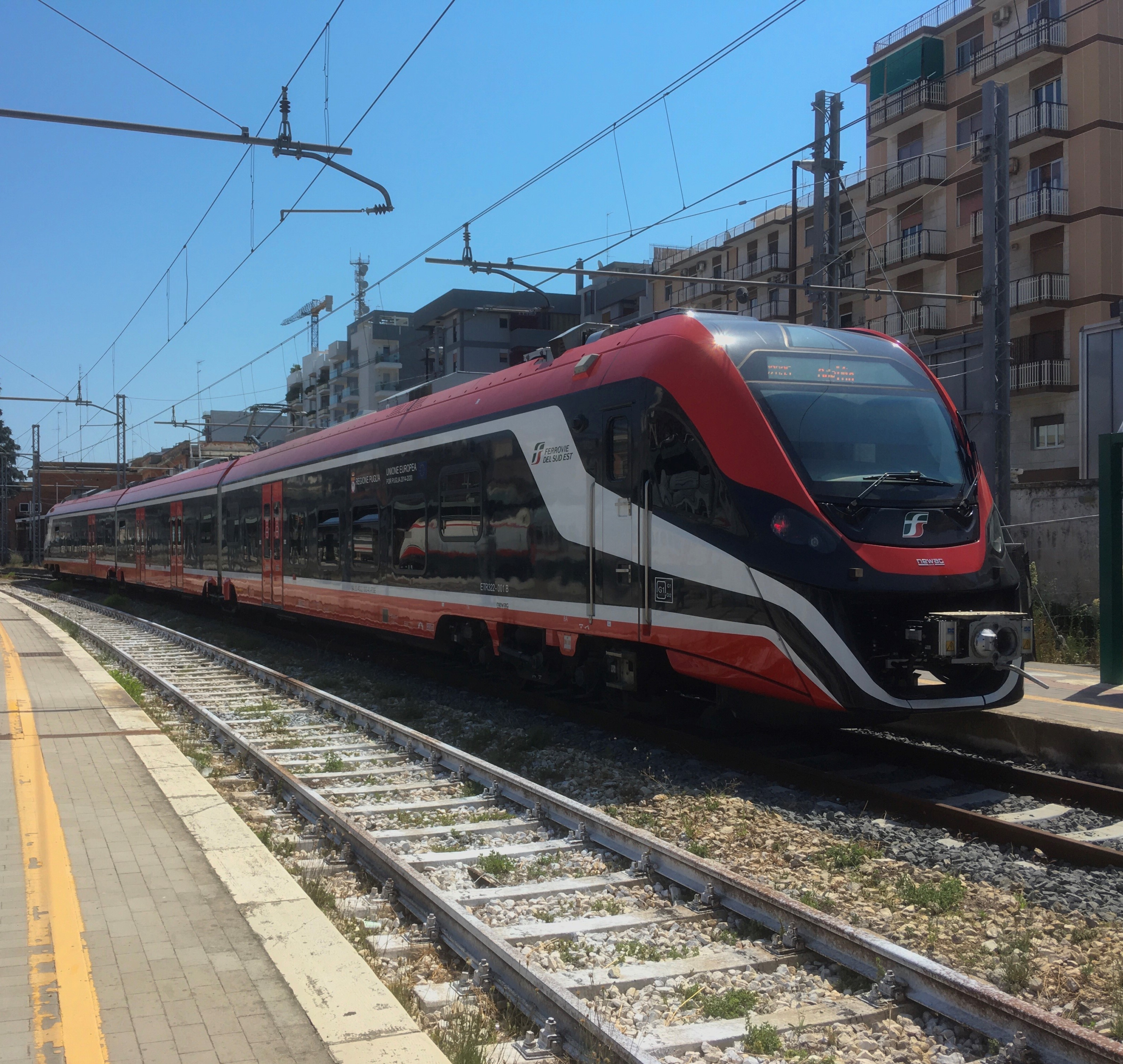 FSE ETR 322 Bari Centrale